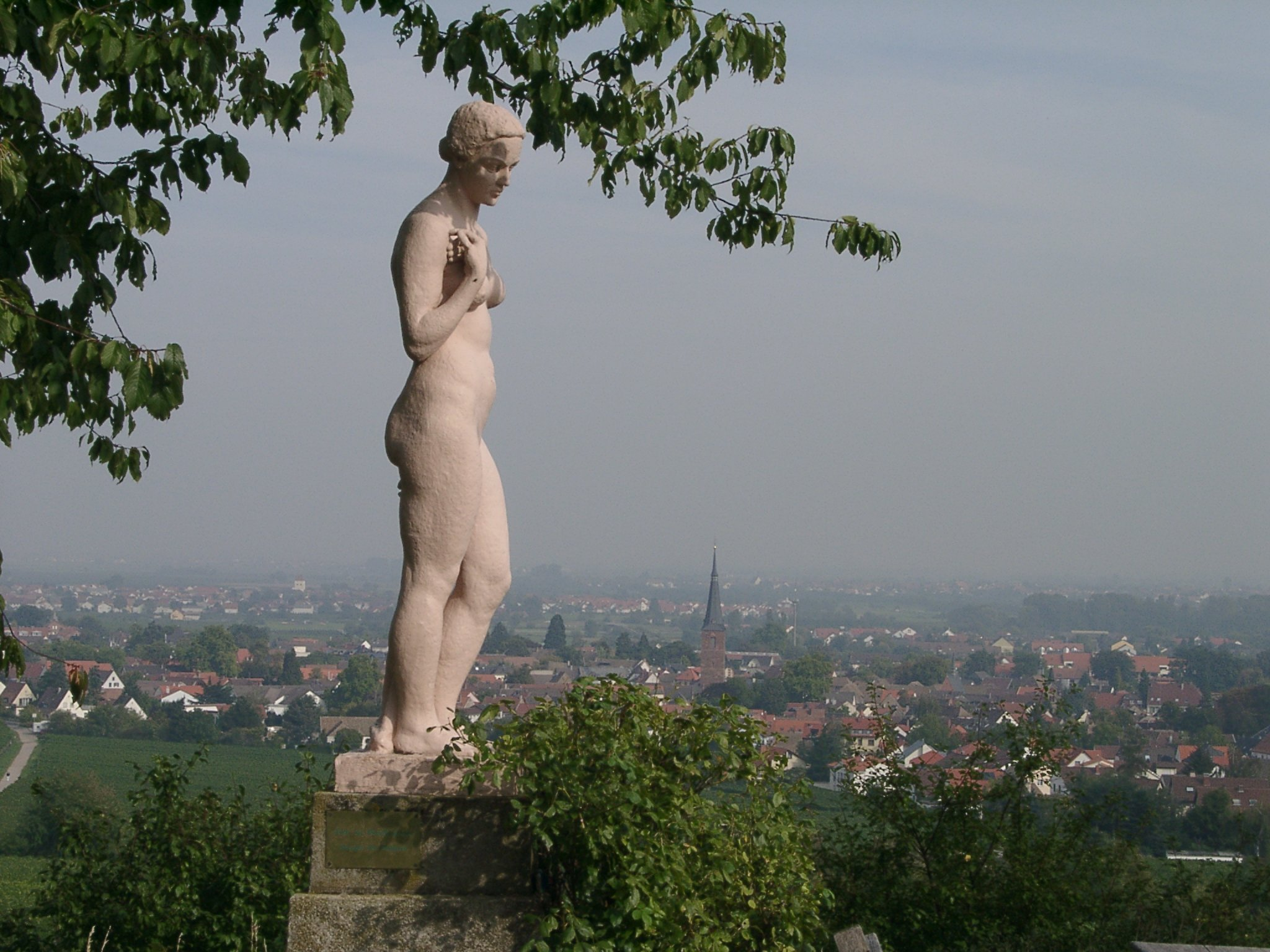 Zu sehen ist die Statue der "Eva" in der Deidesheimer Weinlage "Paradiesgarten", gestiftet vom Deidesheimer Weingut Dr. Deinhard in den 1950er Jahren. Der Ort im Hintergrund ist die Kleinstadt Deidesheim. Nach Kritik von kirchlichen Autoritäten Deidesheims mussten nach ihrer Aufstellung ihre intimen Bereiche mit ehernen Weinblättern bedeckt werden; mittlerweile ließ die Schöne ihre Hüllen aber wieder fallen.